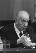 Title: Berliner Begegnung zur Friedensförderung People in the image: Kuczynski, Jürgen Prof. Dr.: Volkswirtschaftler, Wirtschaftshistoriker, Mitglied der Akademie der Wissenschaften (AdW), DDR (GND 118567462) * Kant, Hermann Dr.: Präsident des Schriftstellerverbandes, SED, DDR * Hermlin, Stephan: Vizepräsident des Internationalen PEN-Clubs, Schriftsteller, DDR (GND 118549812) * Engelmann, Bernt: Vorsitzender des Schriftstellerverbandes, Bundesrepublik Deutschland (GND 118530364) * Drewitz, Ingeborg: Schriftstellerin, Bundesrepublik Deutschland Factual corrections and alternative descriptions are encouraged separately from the original description. Additionally errors can be reported at this page to inform the Bundesarchiv. Original historic description: ADN-ZB/Senft/13.12.81 Berlin: Die "Berliner Begegnung zur Friedensförderung" wurde in der DDR-Hauptstadt eröffnet. An dem zweitägigen Treffen nehmen auf Einladung des DDR-Schriftstellers Stephan Hermlin rund 100 Schriftsteller, Künstler und Wissenschaftler aus beiden deutschen Staaten sowie aus weiteren europäischen Ländern und aus Westberlin teil. Unter ihnen sind Prof. Jürgen Kuczynski, Hermann Kant, Stephan Hermlin, Bernt Engelmann (BRD) und Ingeborg Drewitz (Westberlin).-v.l.n.r.